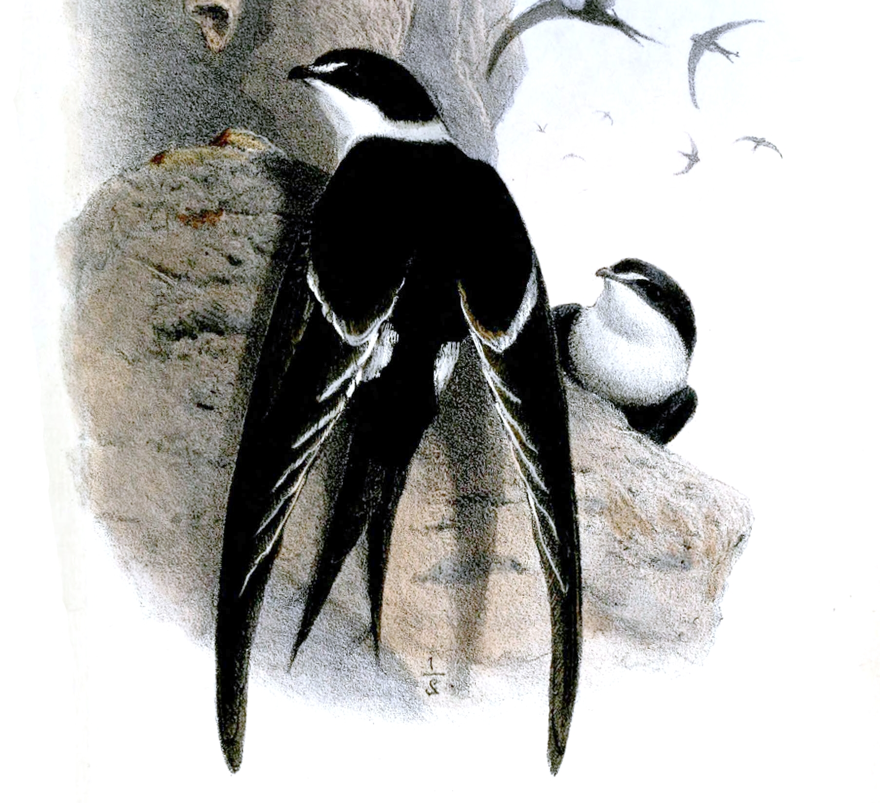 Panyptila sanctijeromae (=P. sanctihieronymi )